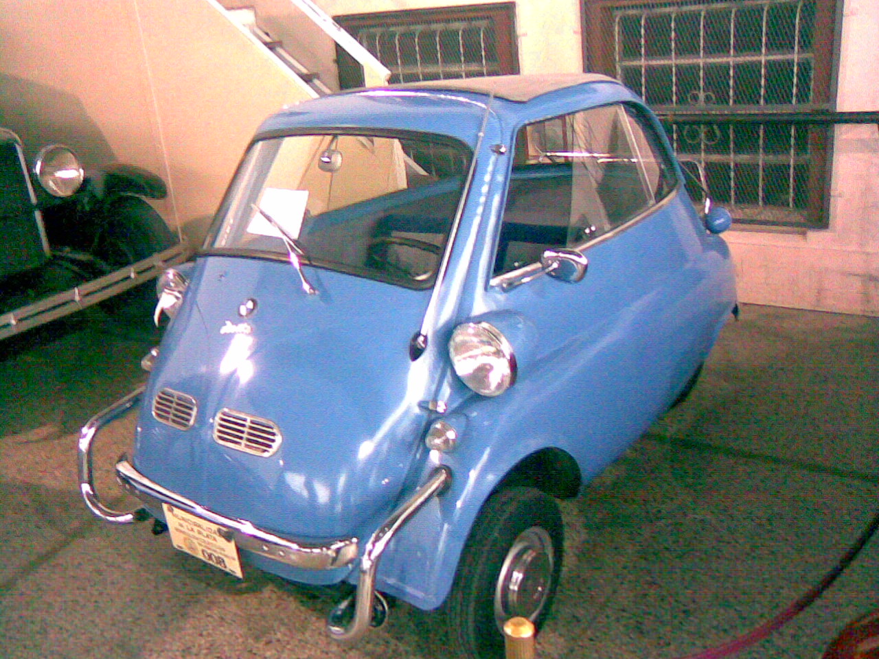 BMW Isetta frente